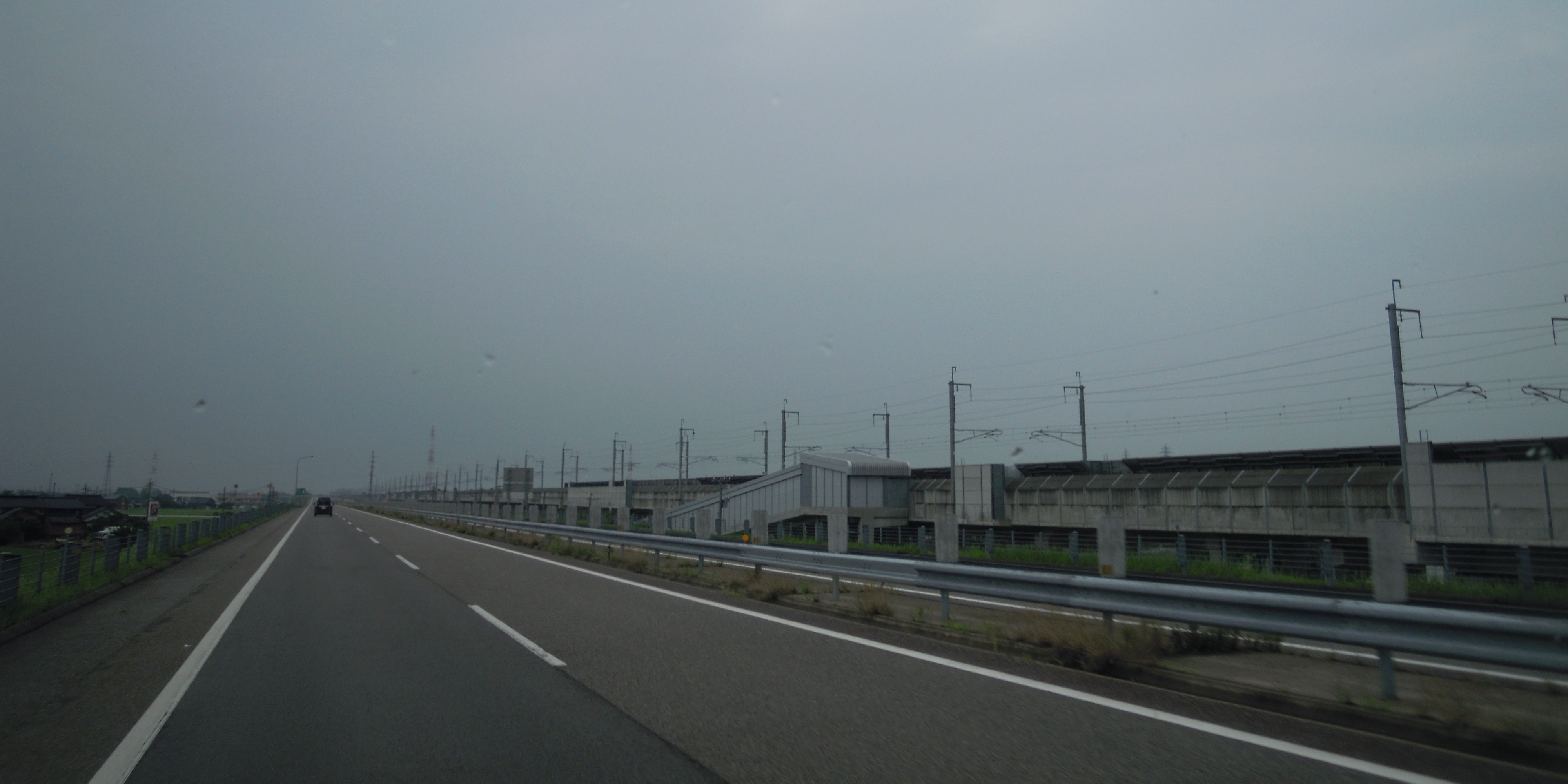 能越自動車道ja:福岡インターチェンジ (富山県) - 高岡インターチェンジで撮影。北陸新幹線が平行している。